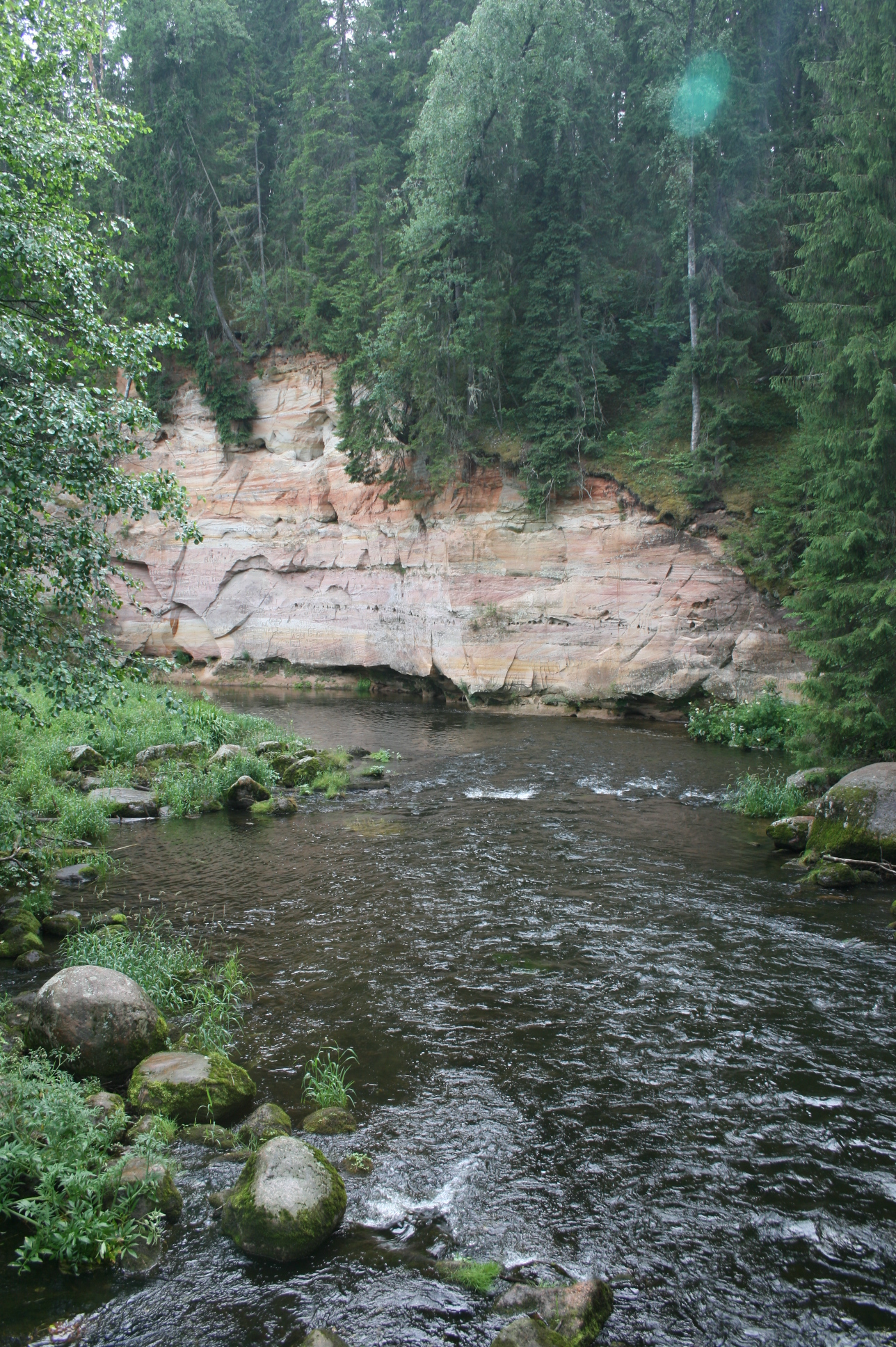 Taevaskoja